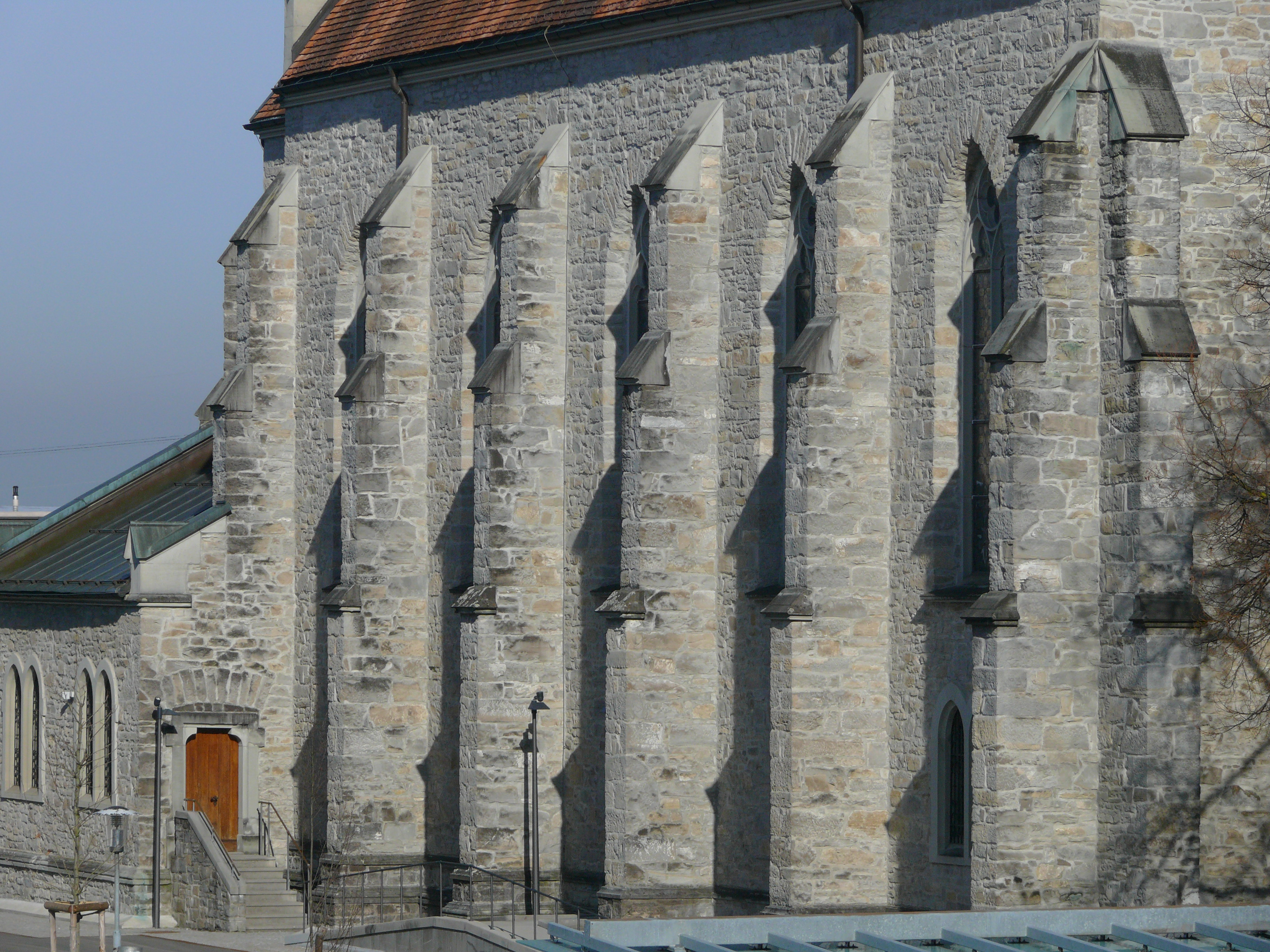 Kath. Pfarrkirche hl. Sebastian